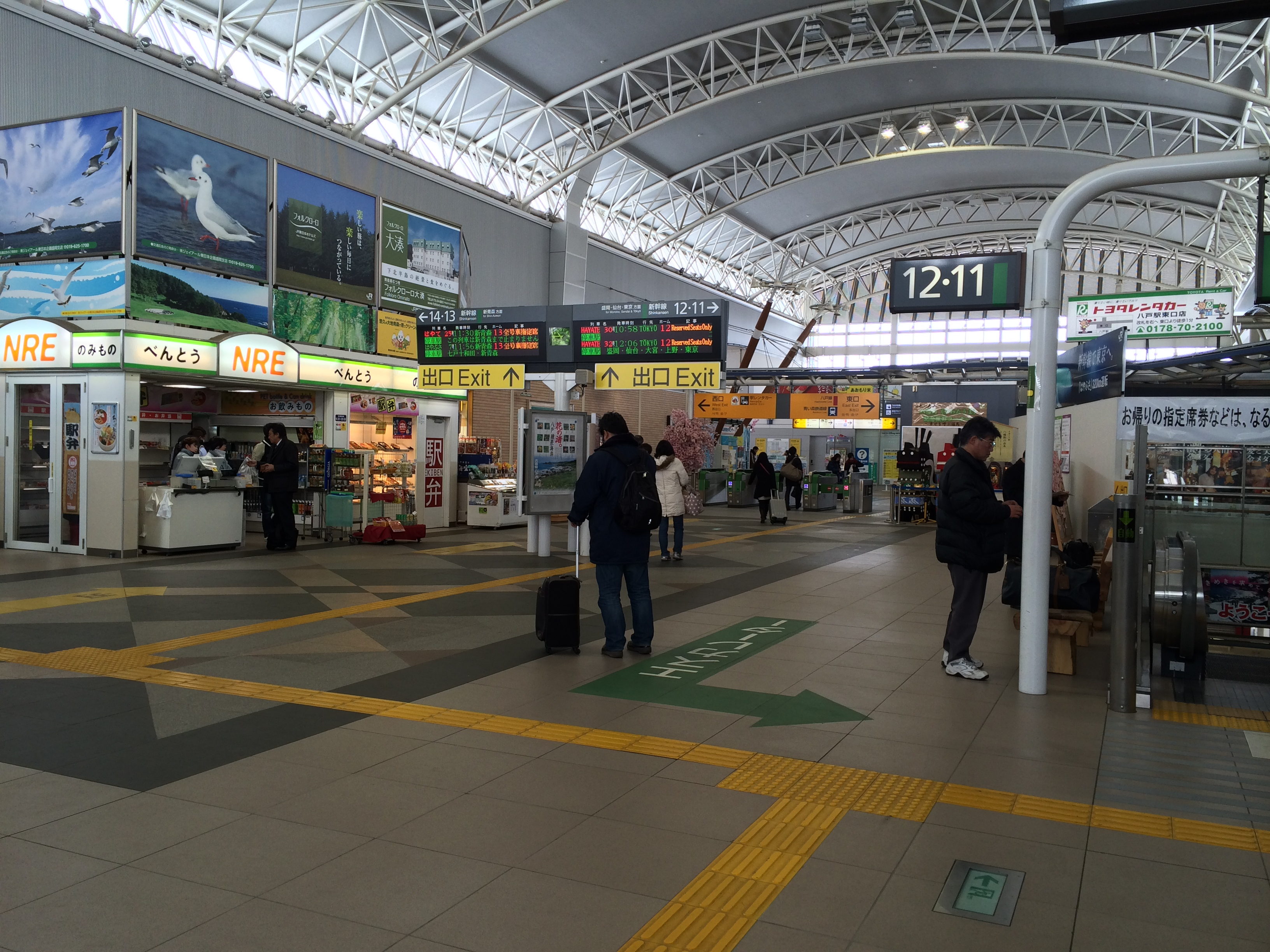 八戸駅新幹線コンコース